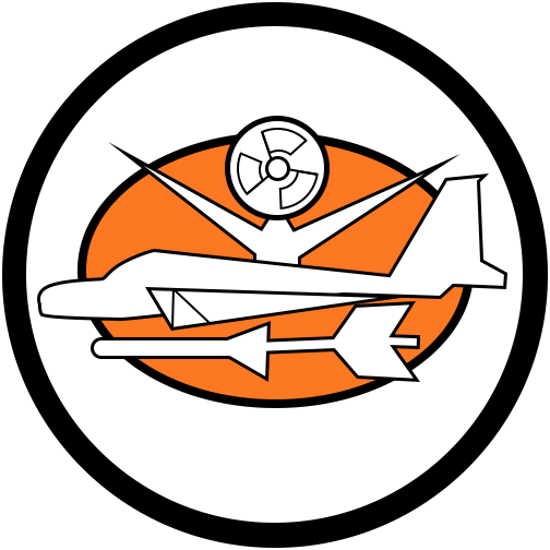 סמל "טייסת 5601" ("טייסת מרכז ניסויי טיסה 5601") של חיל האוויר הישראלי.